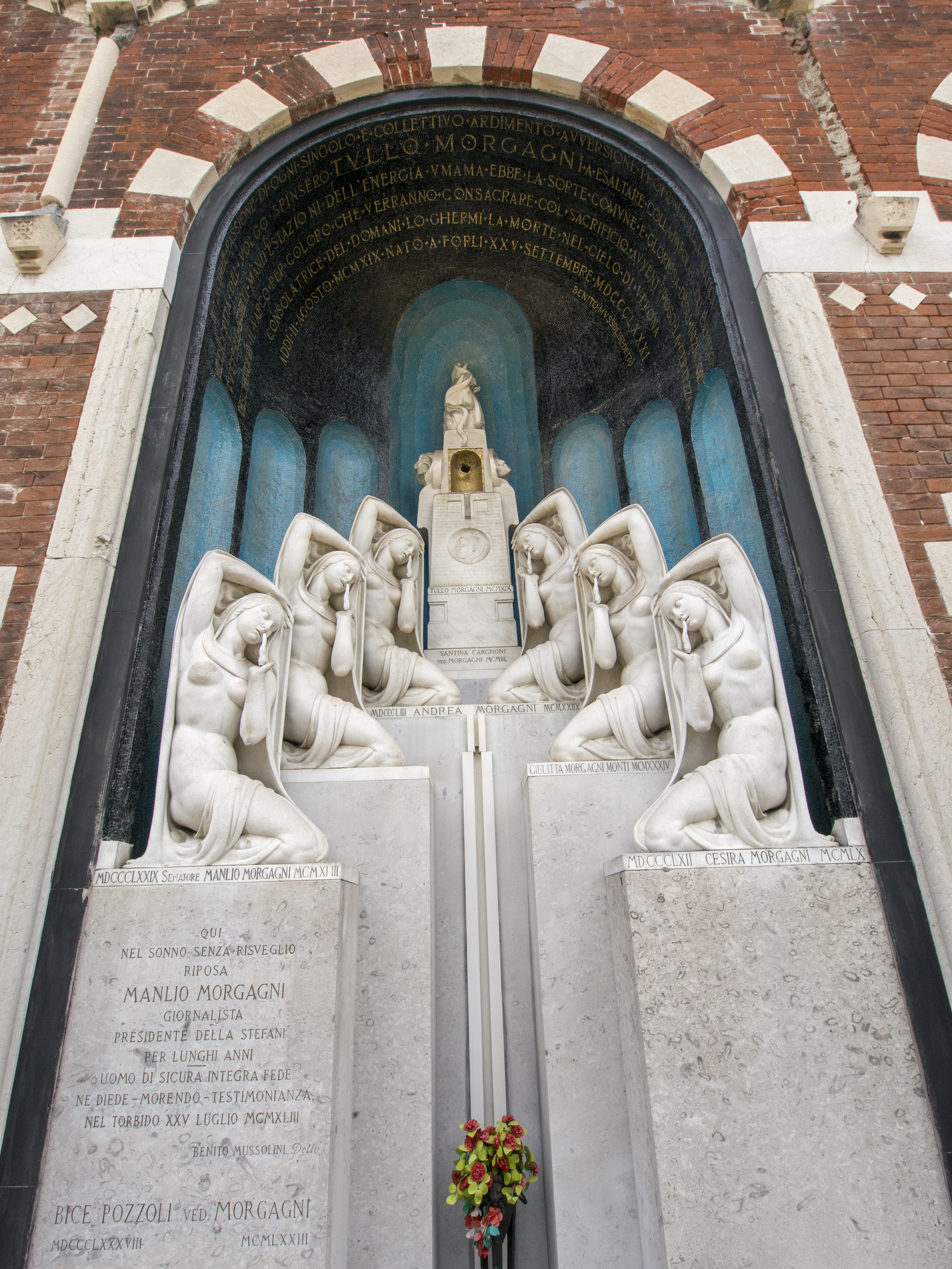 Cimitero Monumentale, Grave Morgagni Architekt Enzo Bifoli, 1921